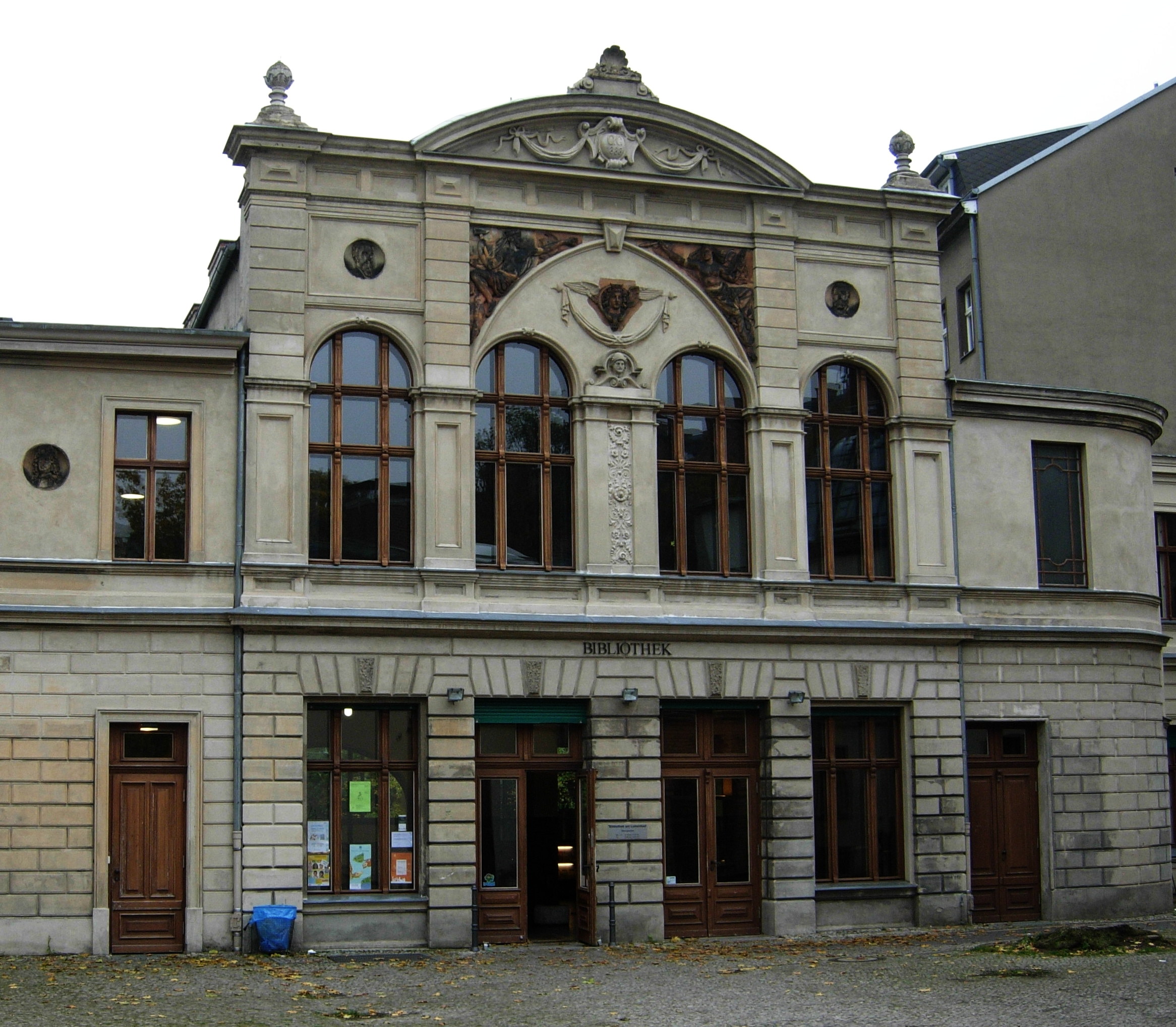 Vestibül-Gebäude (1888) am Luisenbad in Berlin-Mitte (Ortsteil Gesundbrunnen), Rest eines zum ehemaligen Kur- und Vergnügungsbetrieb gehörigen Ensembles an der Travemünder Straße, die entlang der Panke zwischen Badstraße und Osloer Straße verläuft; das Gebäude im Garnier-Stil steht hinter dem Wohnhaus Badstraße 39 und ist seit 1995 Teil der Bibliothek am Luisenbad (Neubau und Altbau-Integration nach Entwürfen von Rebecca Chestnutt und Robert Niess); der Puttensaal des Vestibül-Gebäudes (hinter den vier Rundbogenfenstern), der ehemalige Ballsaal, wird heute noch für kulturelle Veranstaltungen genutzt; die eisenhaltige Quelle auf dem Areal des Hauses Badstraße 39 wurde 1748 zum ersten Mal erwähnt, 1751 vom Chemiker Andreas Sigismund Markgraf (1709 – 1782) als medizinisch wirksam erkannt, ab 1758 vom Apotheker Heinrich Wilhelm Behm (1708 – 1780) zum Heilbad ausgebaut und als Friedrichs-Gesundbrunnen bezeichnet (zu Ehren Friedrichs II., der das Privileg gewährt hatte); der Mediziner Christian Gottfried Flittner (1770 – 1828) kaufte 1807 die Badeanlage und bat 1809 die Königin Luise, das Bad nach ihr benennen zu dürfen; seitdem heißt es (und was von ihm übrig geblieben ist) Luisenbad; Nachbesitzer Flittners waren der Leiter des Taubstummeninstituts (Linienstraße) Ludwig Graßhoff (1770 - 1851), der Maler Carl Wilhelm Gropius (1793 - 1870) und ab 1879 die Brüder Carl und Emil Galuschki (die das Bad in Marienbad umtauften); sie ließen das Vestibül-Gebäude (die Abkürzung in der Kartusche am Giebel weist vermutlich auf Carl Galuschki hin) und Häuser an der Badstraße errichten; u.a. das Haus Badstraße 39, an dessen zur Travemünder Straße gelegenen Eckteil das Relief eines Brunnenhäuschens zu sehen ist, es trägt die Inschrift In Fonte Salus (in der Quelle liegt Gesundheit); die Quelle versiegte gegen Ende des 19. Jahrhunderts (vermutlich infolge des Baubooms); auf das Luisenbad weisen außer dem Ortsteilnamen auch die Brunnen-, Bad- und Behmstraße hin.